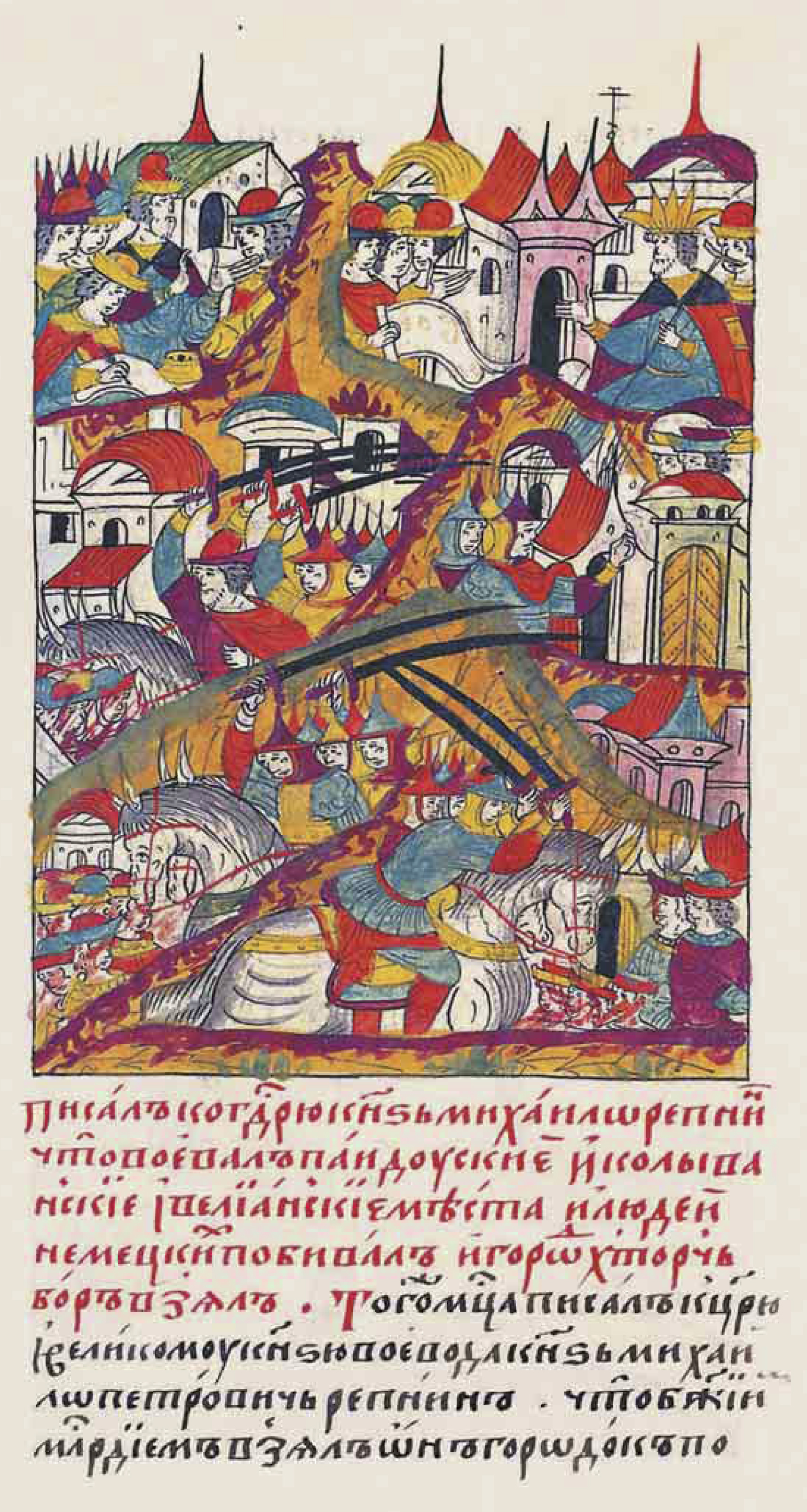 Писал к государю князь Михаил Репнин, что завоевал найдуские и колыванские, и велианские места и немецких людей побил, и город Хторчбор захватил. В том же месяце писал к царю и великому князю воевода князь Михаил Петрович Репнин, что Божьим милосердием взял он городок По- [тушин]